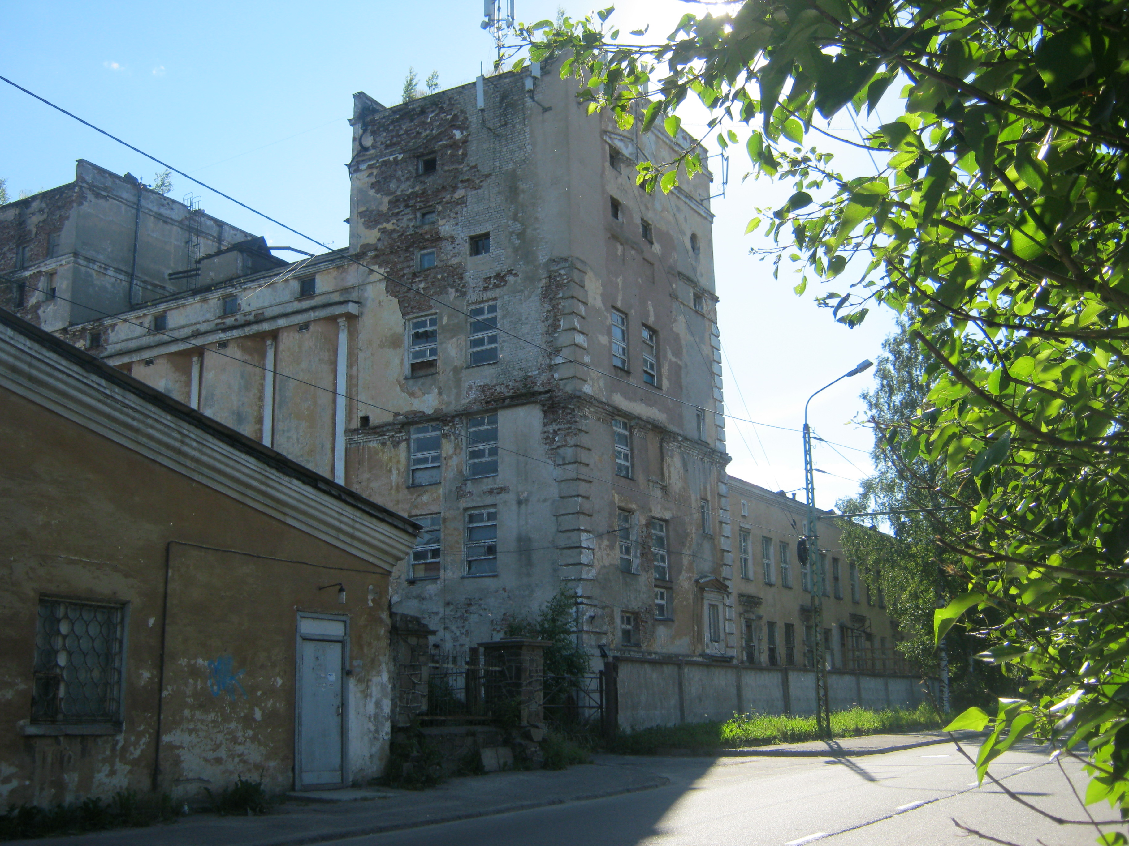 Промышленность Петрозаводска